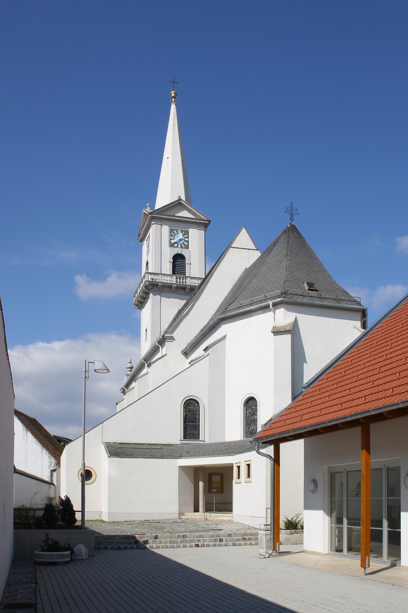 Die 1674 bis 1677 erbaute kath. Pfarrkirche hl.-Nikolaus in der burgenländischen Stadt Purbach am Neusiedler See (Turm 1728 errichtet).